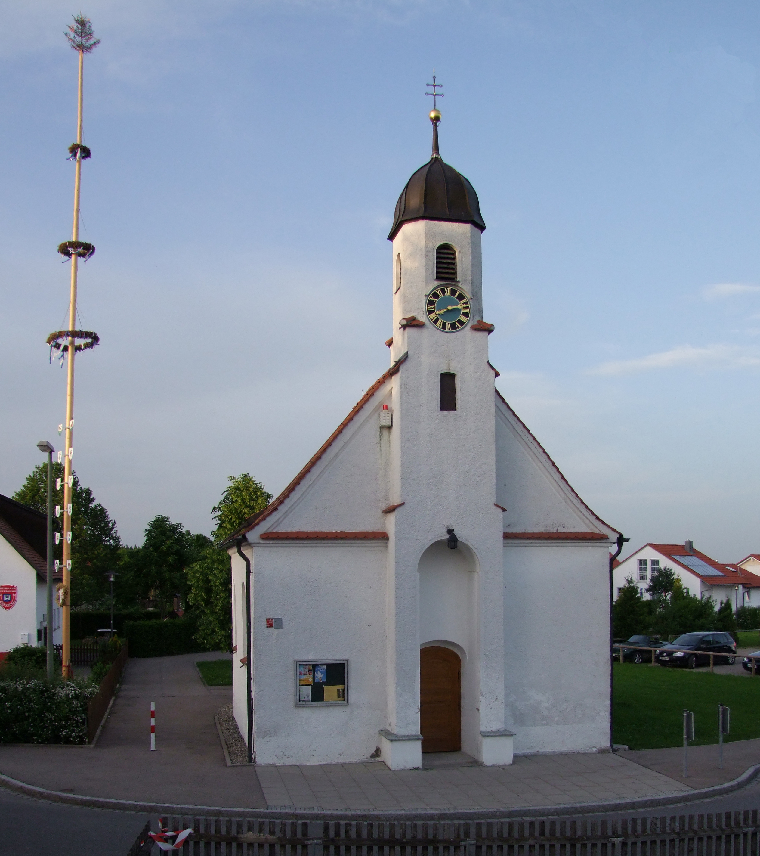 St. Nepomuk im oberschwäbischen Eisenburg, einem Stadtteil von Memmingen